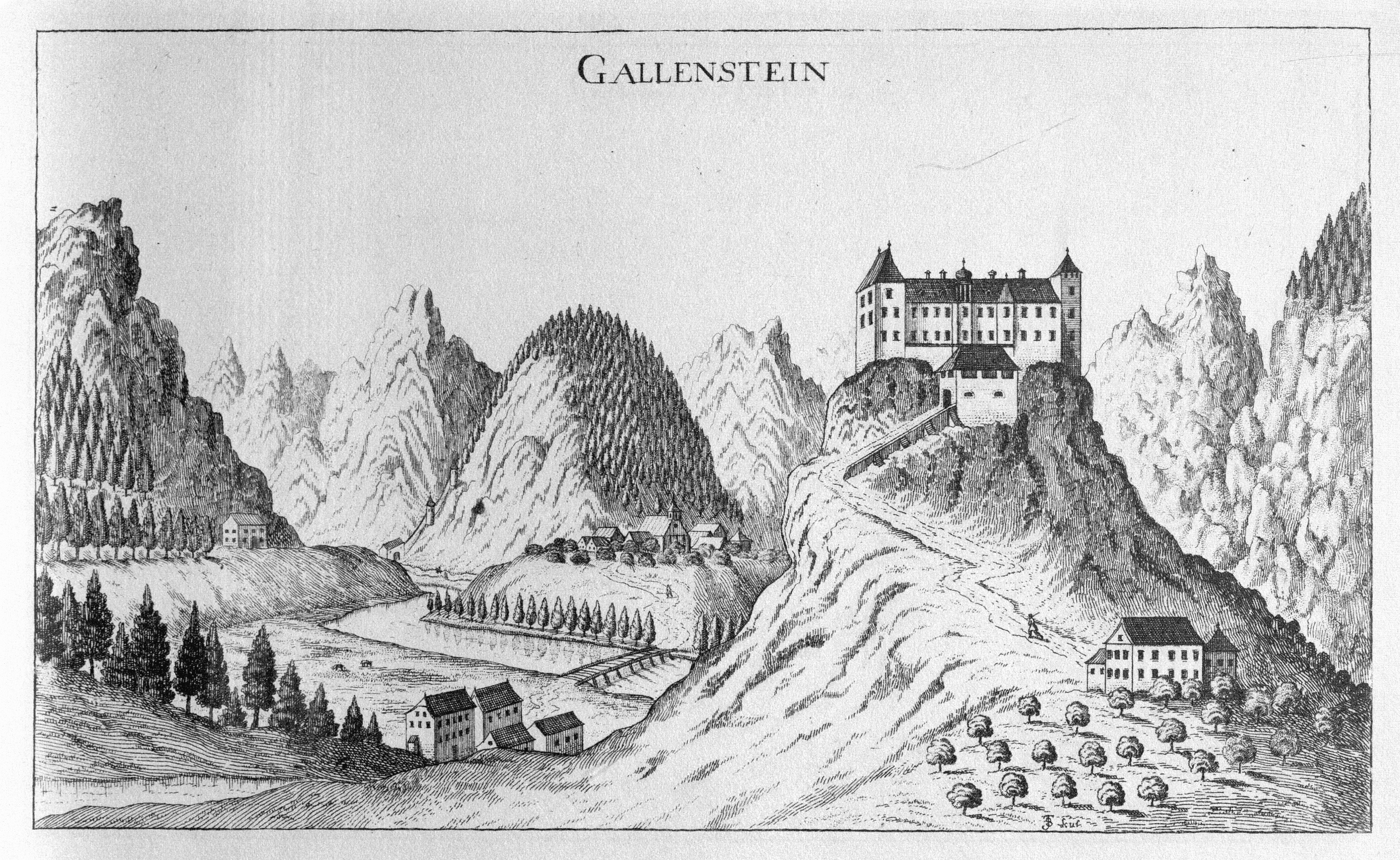 G. M. Vischers Käyserlichen Geographi, Topographia Ducatus Stiriae, Das ist: Eigentliche Delineation / und Abbildung aller Städte / Schlösser / Marcktfleck / Lustgärten / Probsteyen / Stiffter / Clöster und Kirchen / so es sich im Herzogthumb Steyrmarck befinden; Und anjetzo Umb einen billichen Preyß zu finden seynd Bey Johann Bitsch Universitäts Buchhandlern / Auff dem Juden=Platz bey der guldenen Saulen. Graz 1681 Die Nummerierung der Dateien folgt der alphabetischen Reihung der Orte